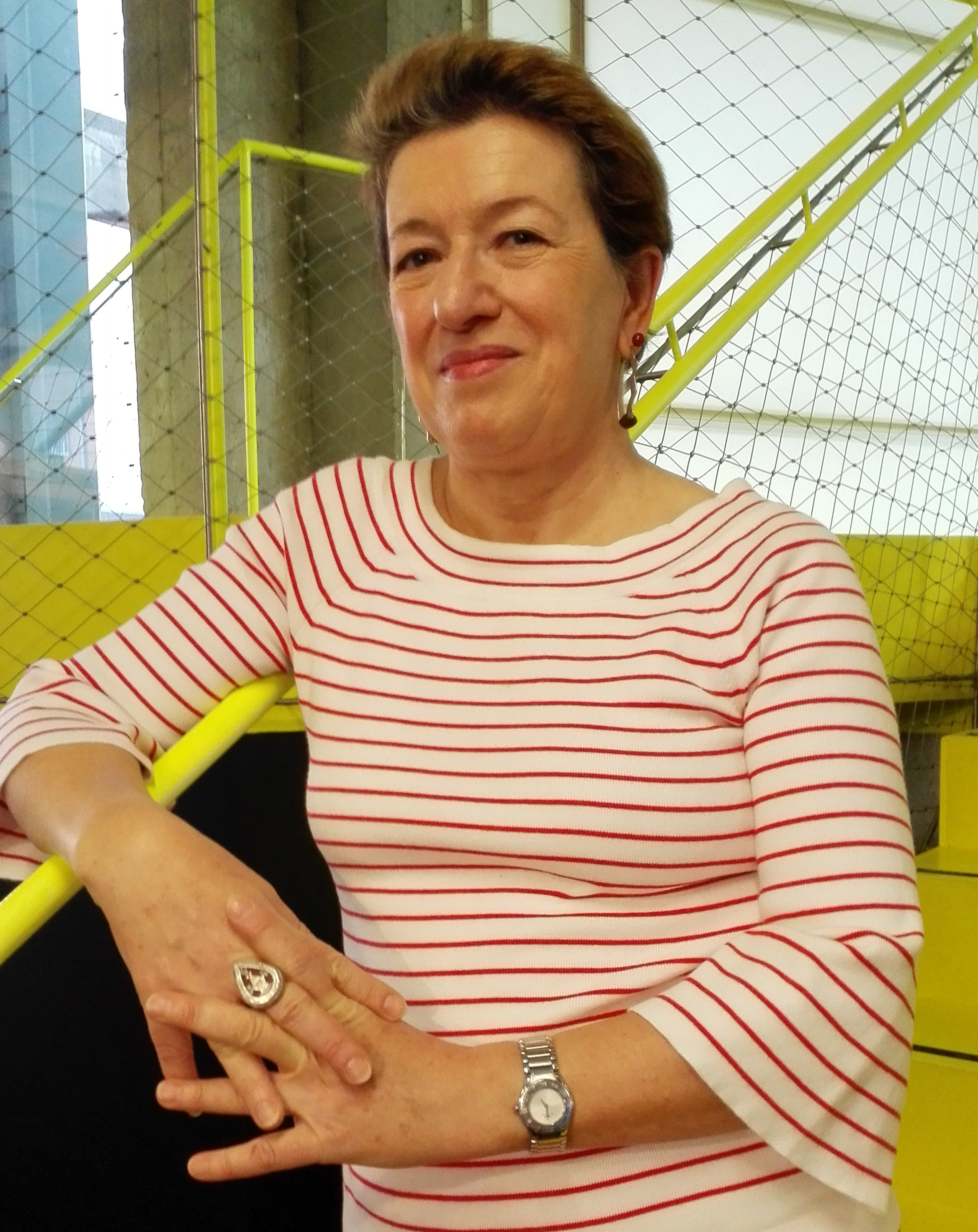 Plano medio de Laura Freixas en Medialab Prado Madrid octubre de 2017